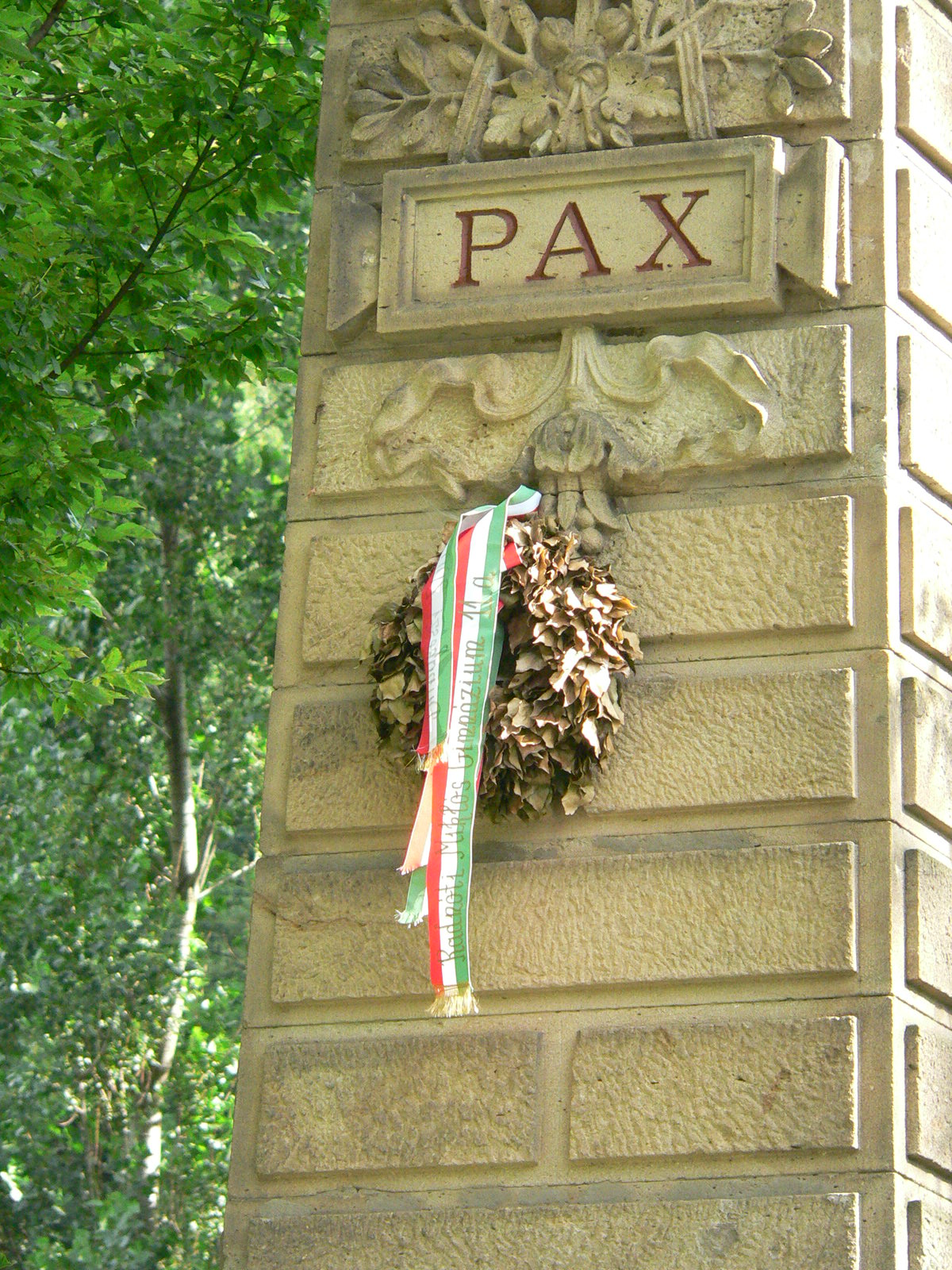 Zalatna, az 1848-as mészárlás emlékműve